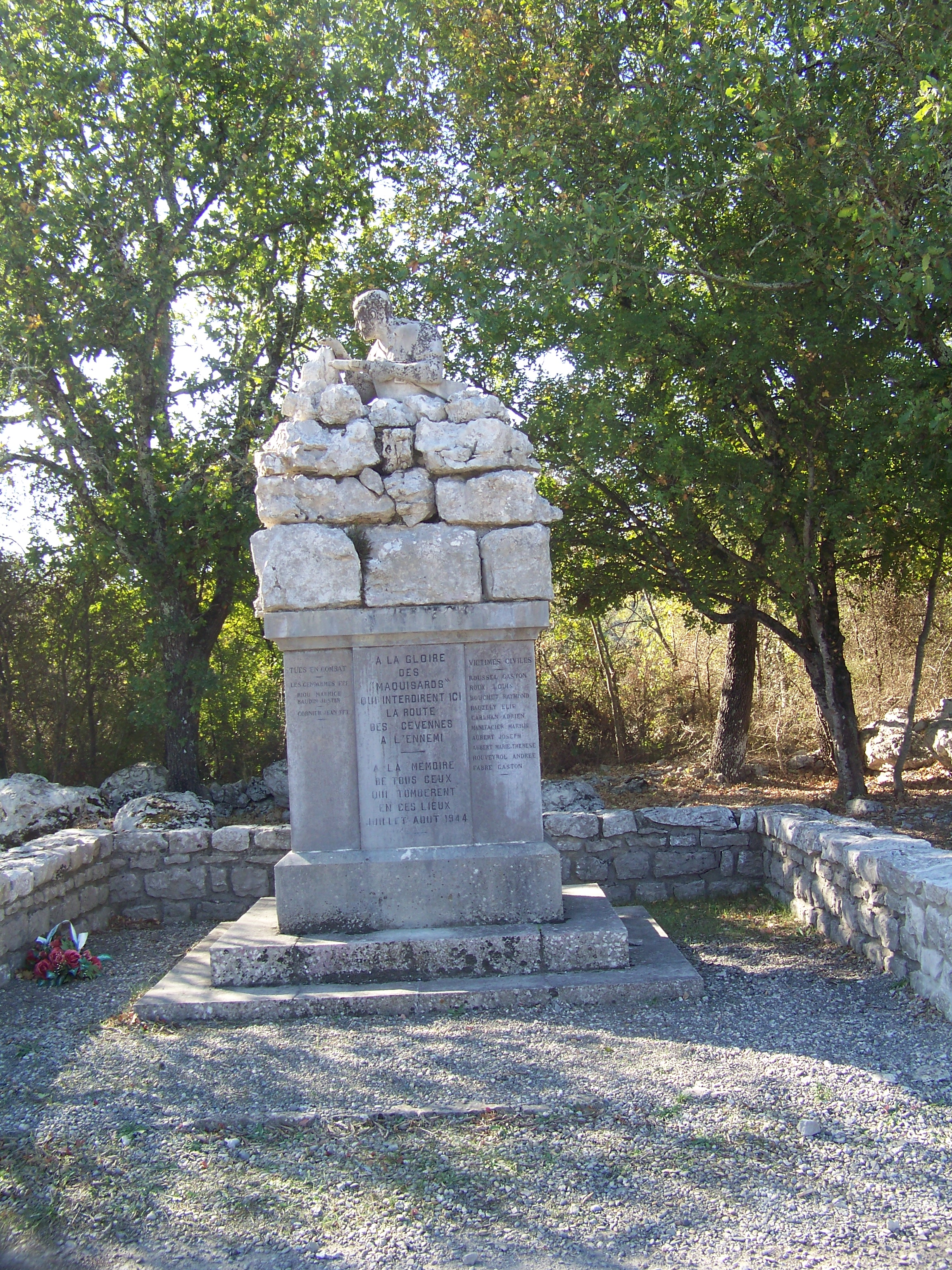 Monument commémoratif des combats d'aout et septambre 1944 à Banne